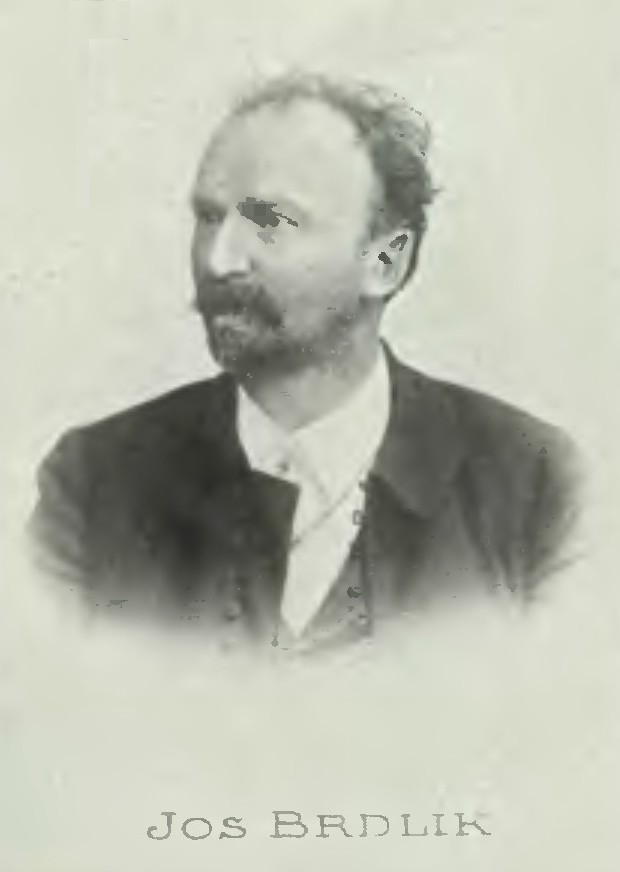 Portrét – Josef Brdlík (1848-1932), Český podnikatel a politik .